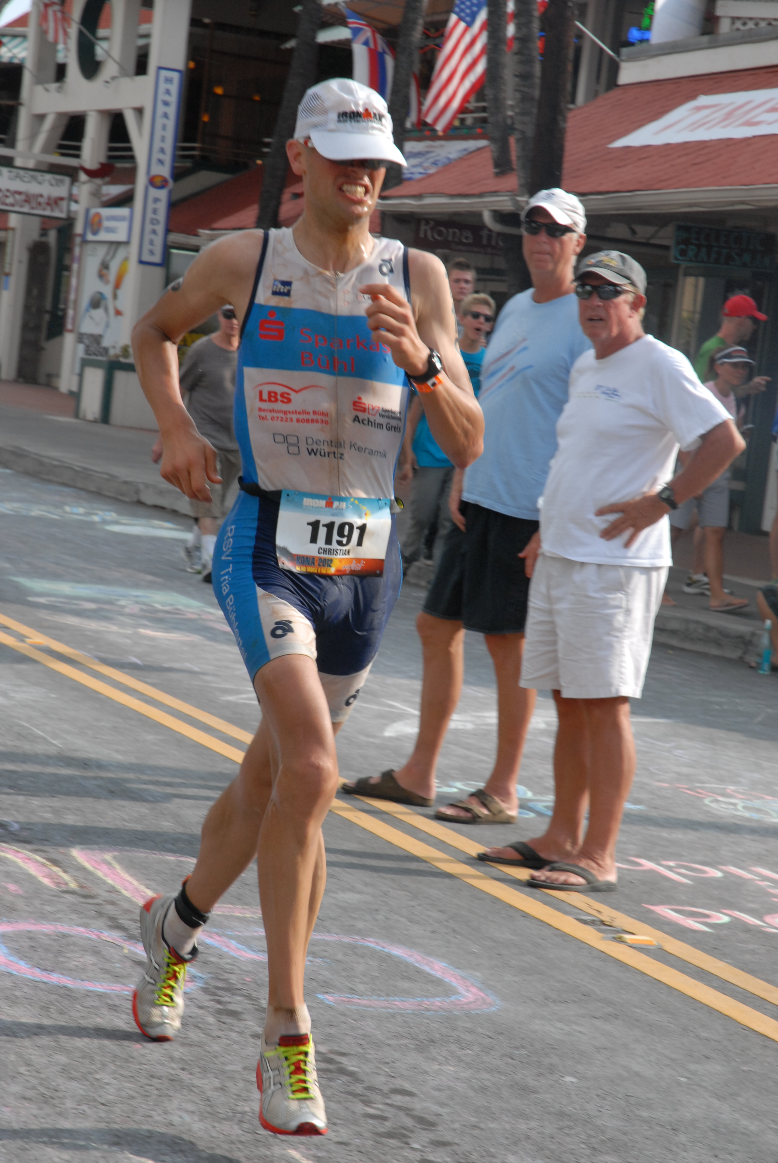 Christian Müller, Ironman Hawaii 2012, 300 m vor dem Ziel